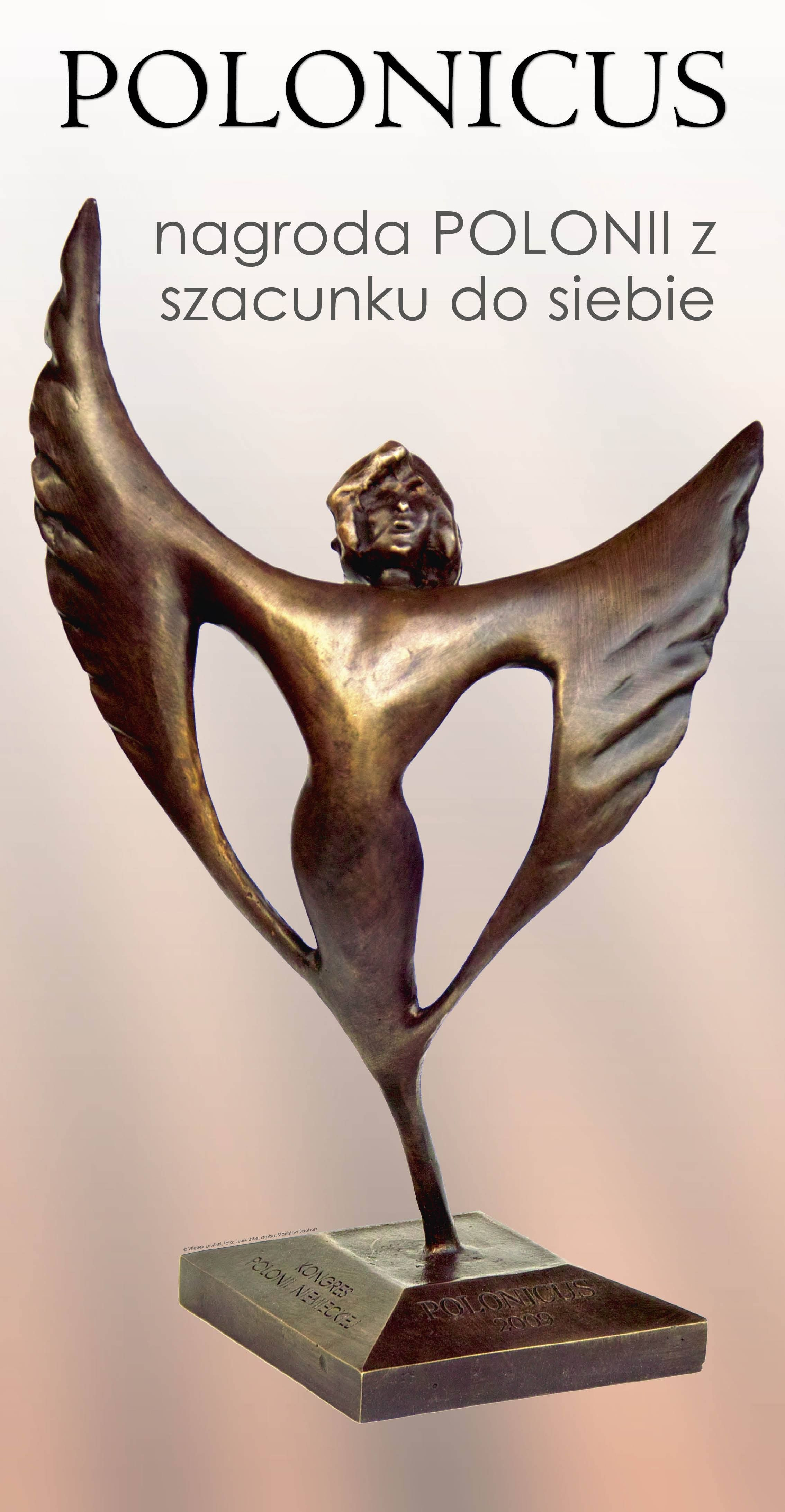 Statuetka POLONICUS przedstawiacjąca uskrzydloną postać odważnego i dynamicznego młodzieńca